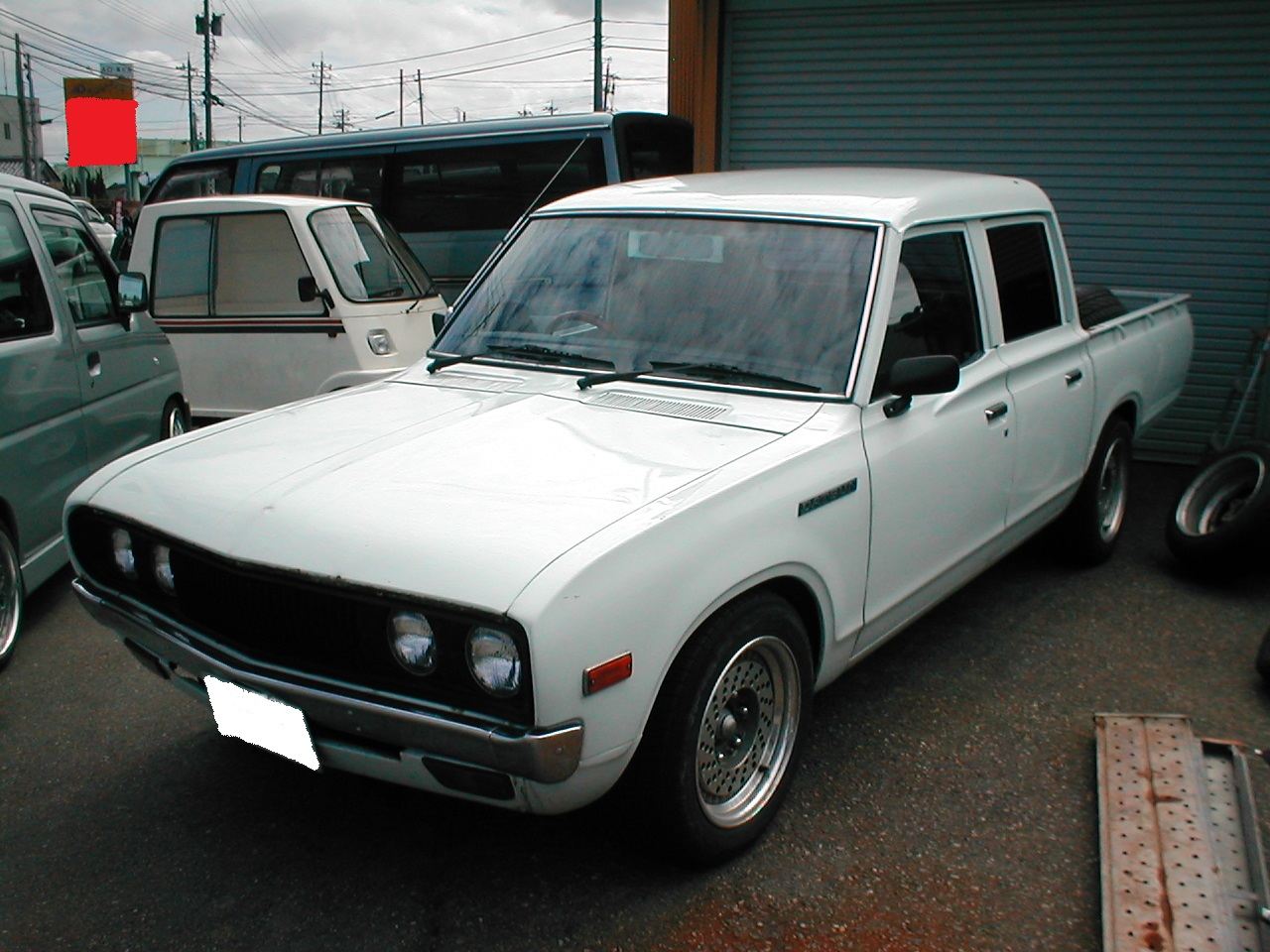 ダットサントラック620型 ダブルキャブの４ドア仕様です。日本仕様のカタログには無かった４ドアです。